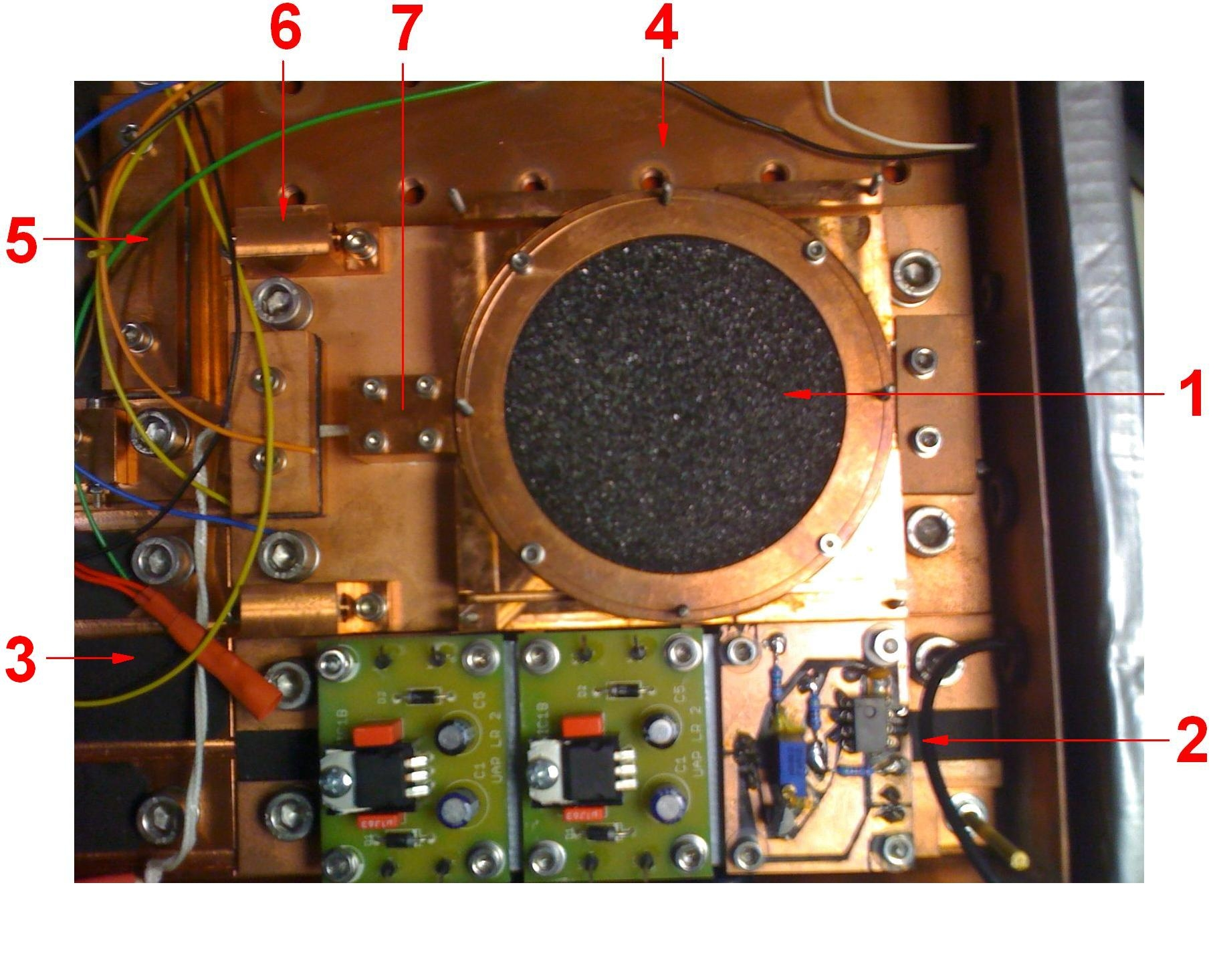 Teilgeöffneter und teilvervollständigter Interferometerinnenraum für die Durchführung der Time-Bin-Konfiguration.